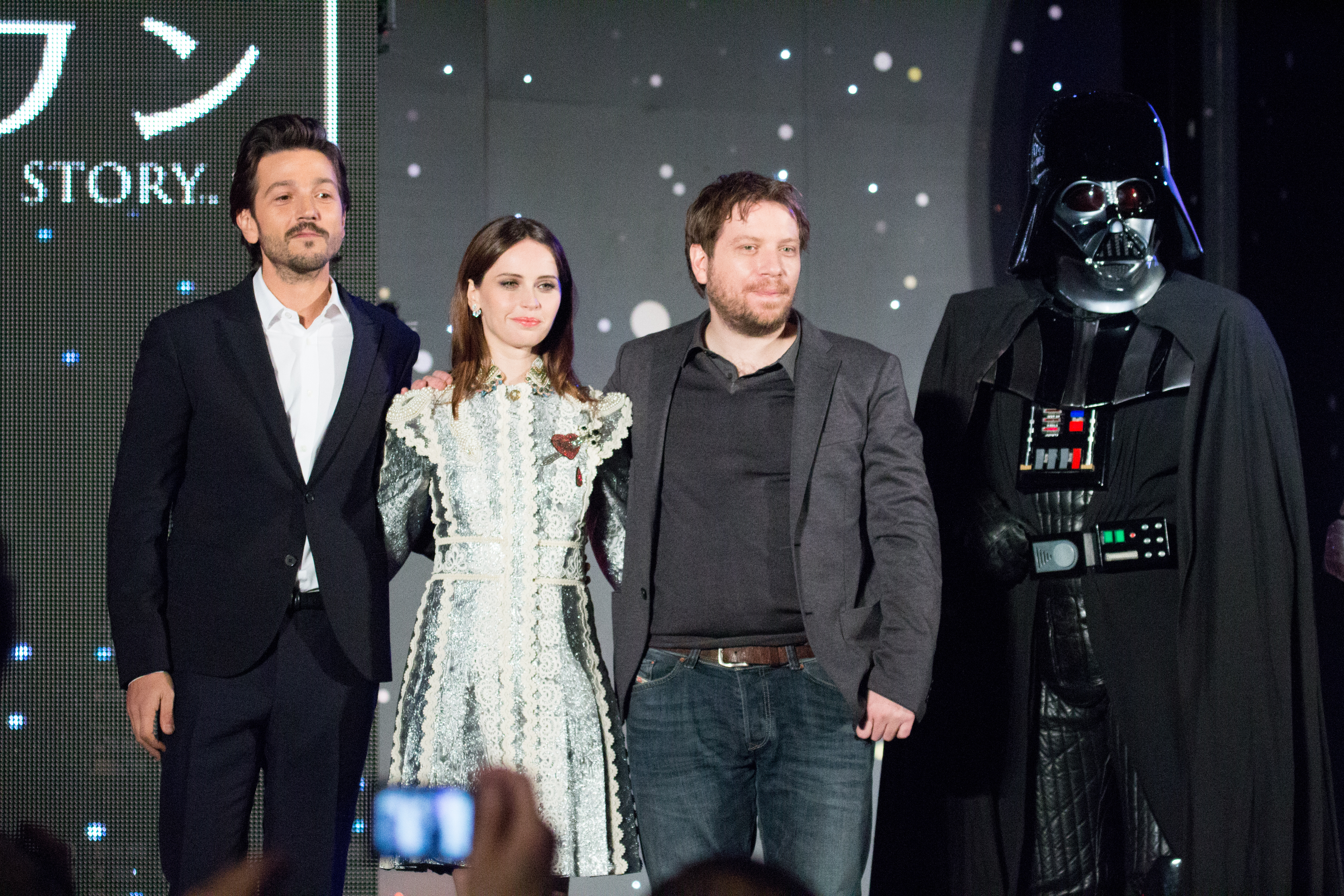 ローグ・ワン/スター・ウォーズ・ストーリー ジャパン・プレミア レッドカーペット ディエゴ・ルナ フェリシティ・ジョーンズ ギャレス・エドワーズ